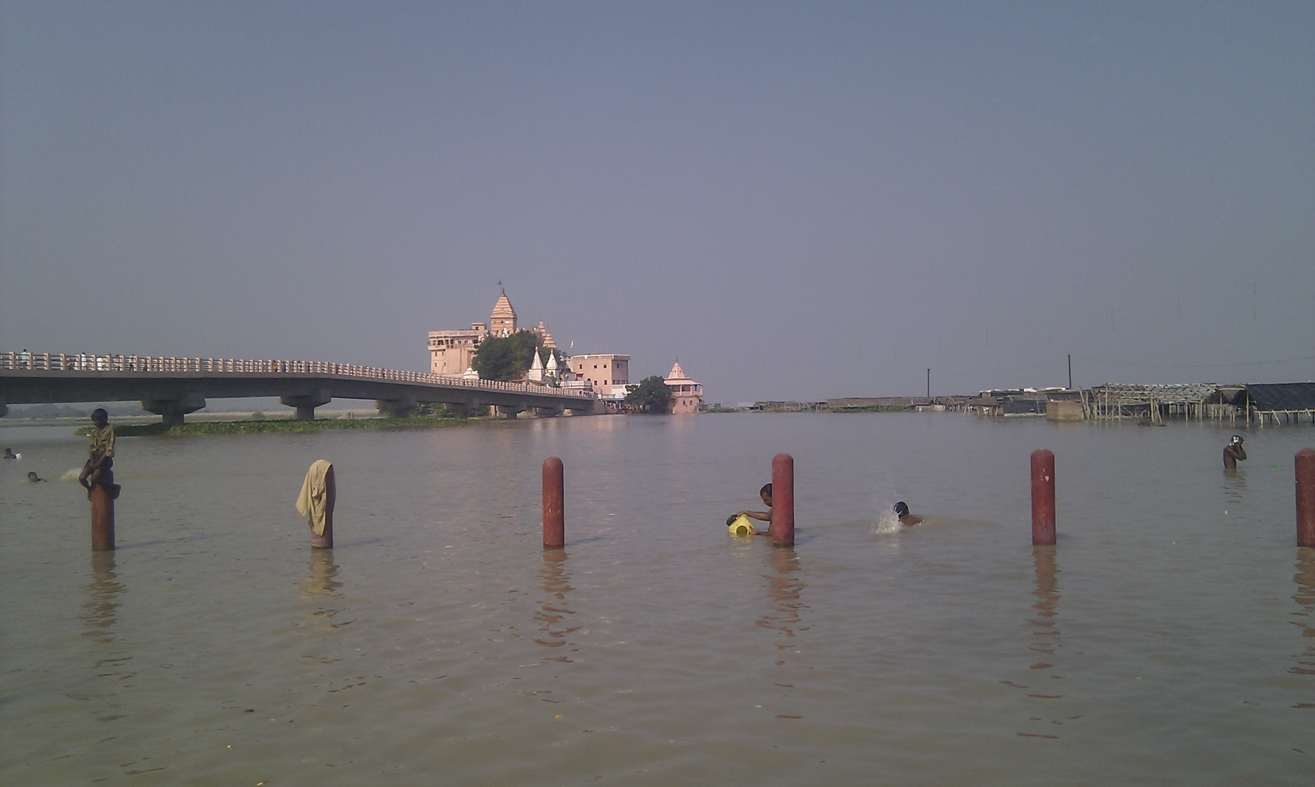 Ajgaibi Nath Temple